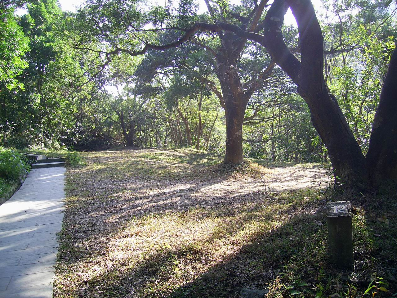 中文（香港）: 基維爾營地12號營區